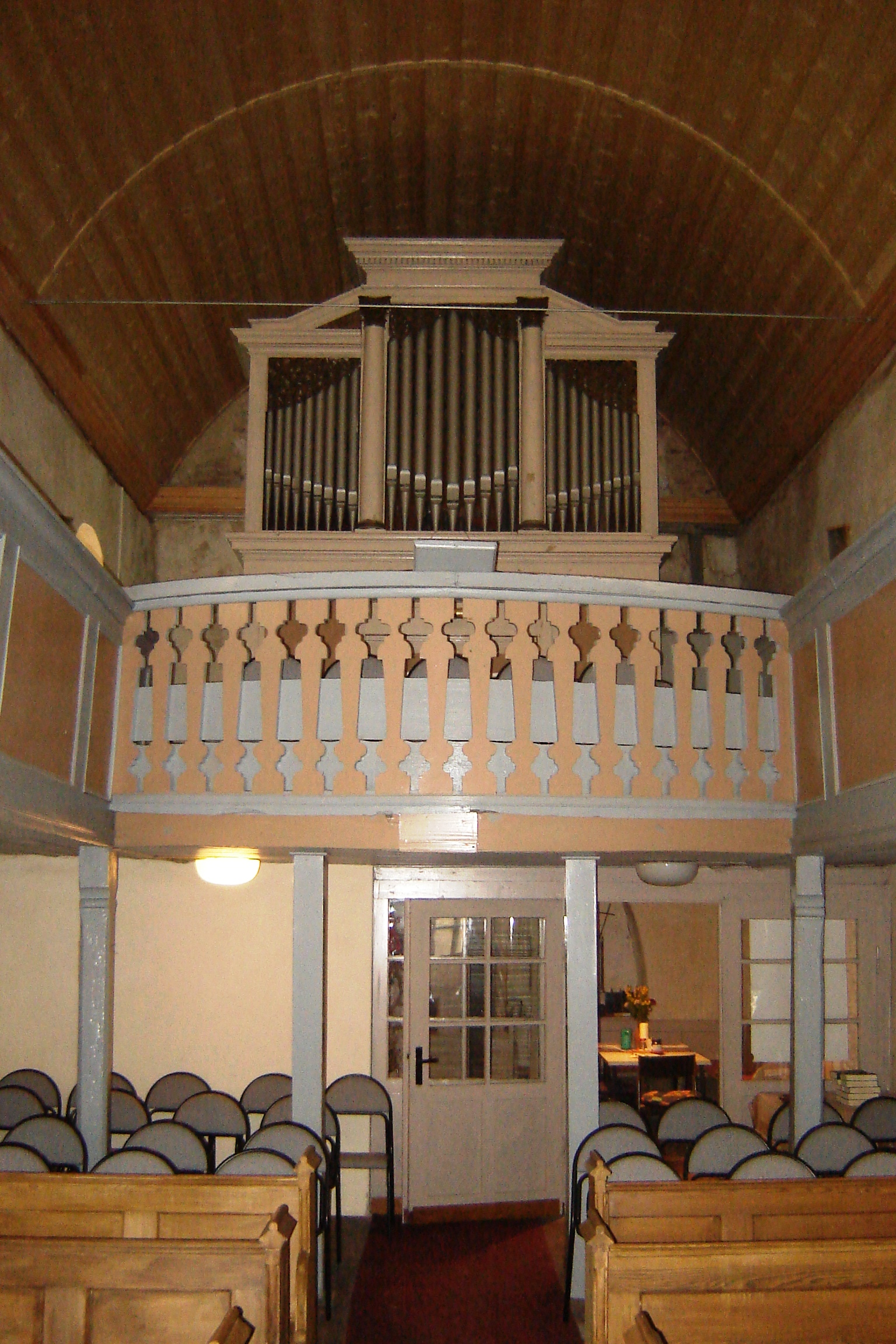 St.-Salvator-Kirche (Kleinmühlingen), Orgel